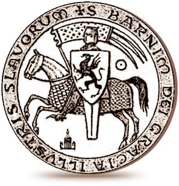 Pieczęć Barnima I. Szczecin, z 1234